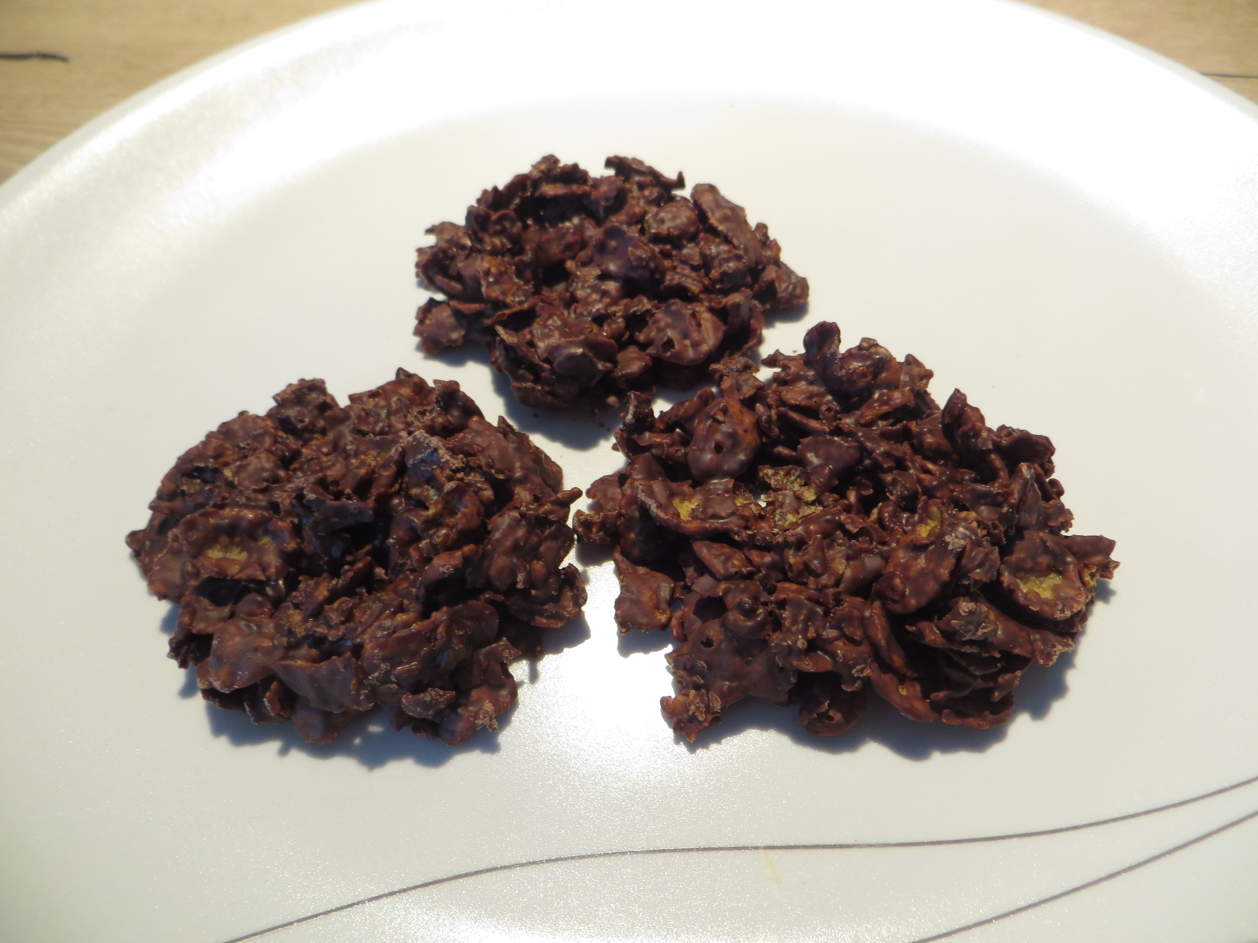 Des roses des sables au chocolat noir.